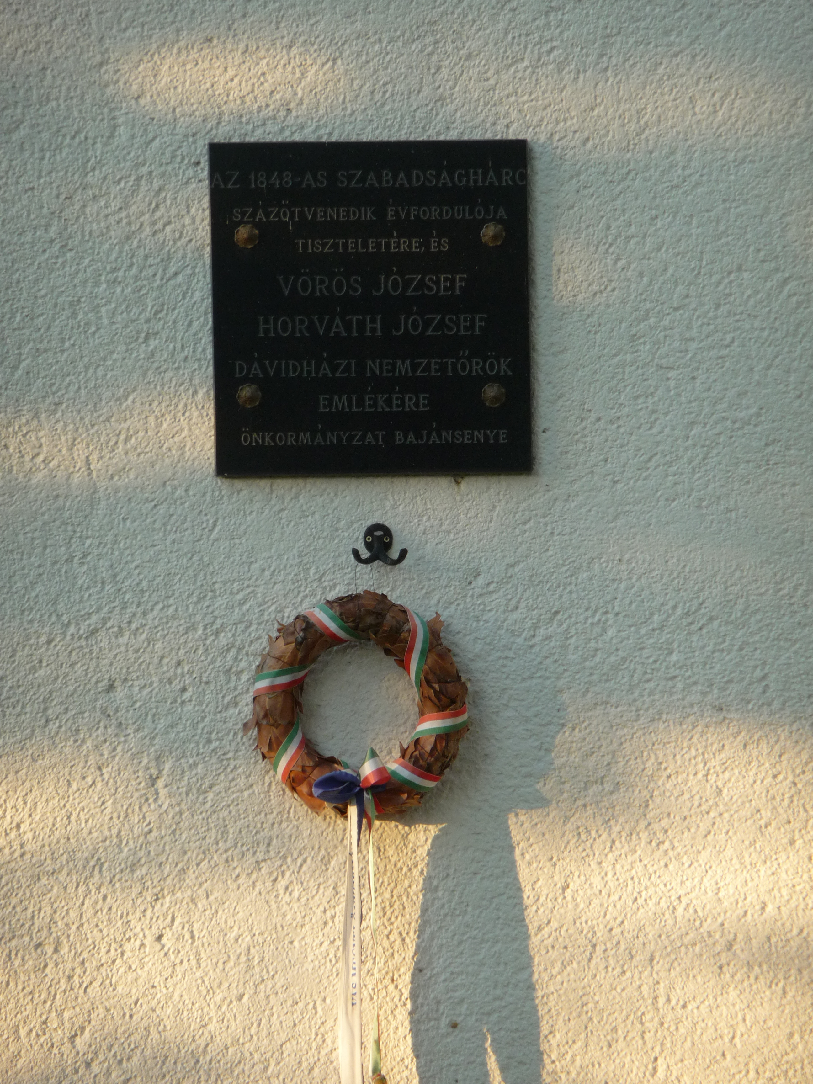 A dávidházi nemzetőrök emléktáblája a katolikus templom falán, Bajánsenye